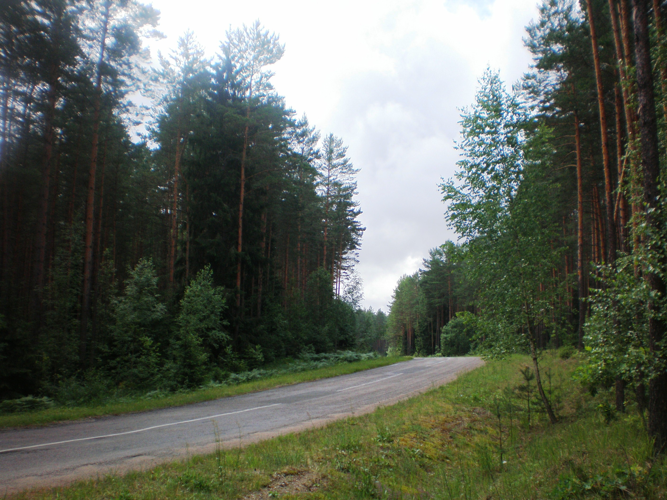 Linkmenų Forest between Ginučiai and Vaidžiuliškės in Ignalina district